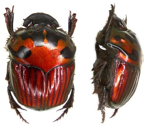 Familie: Scarabaeidae Grösse: 18-25 mm Verbreitung: Brasilien, Franz. Guana, Surinam, Guyana Fundort: Brasilien, Para Santarem leg. 1985; det. U.Schmidt Foto: U.Schmidt, 2006